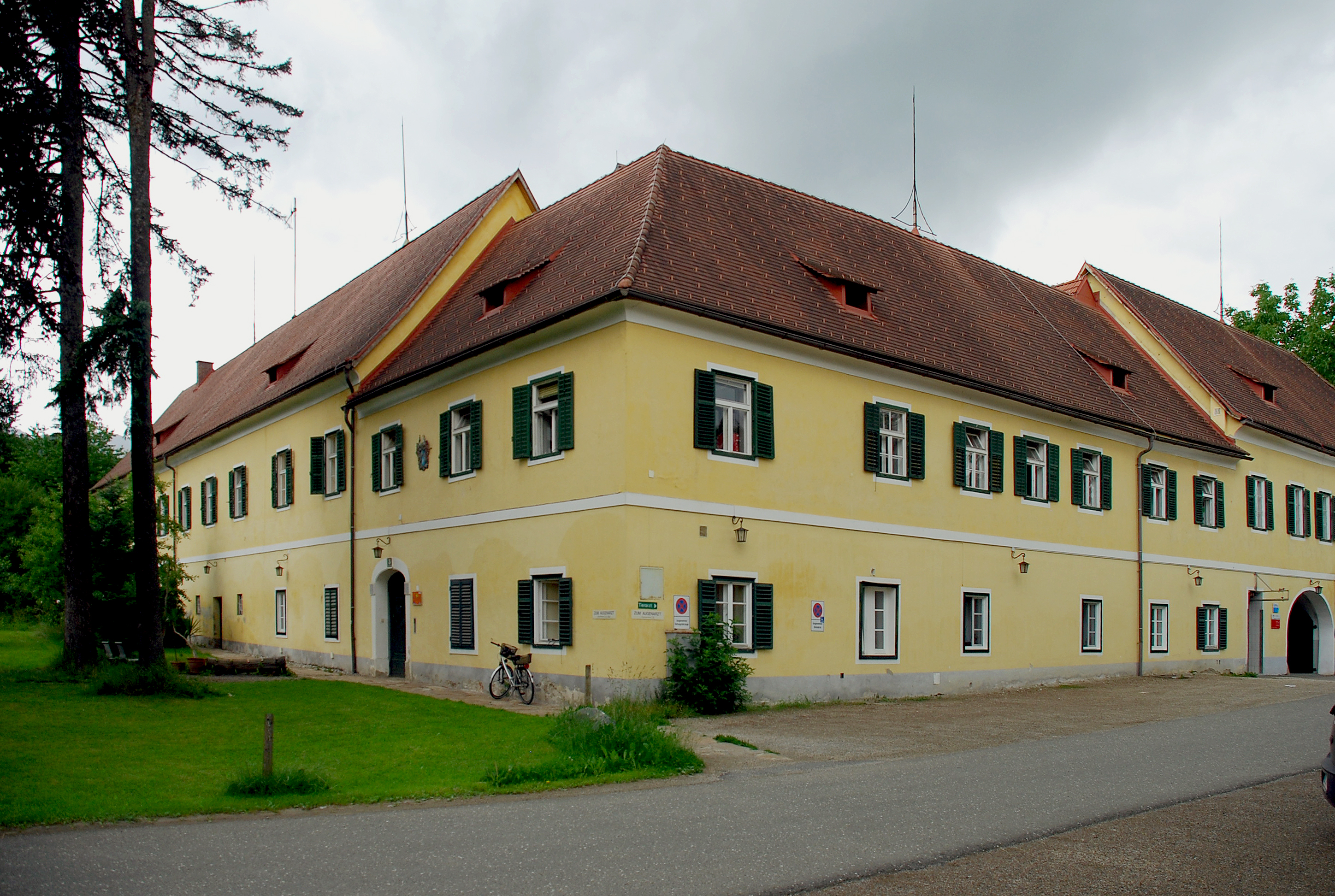 Deutschlandsberg, Steiermark, Österreich: Feilhofen Wirtschaftsgebäude